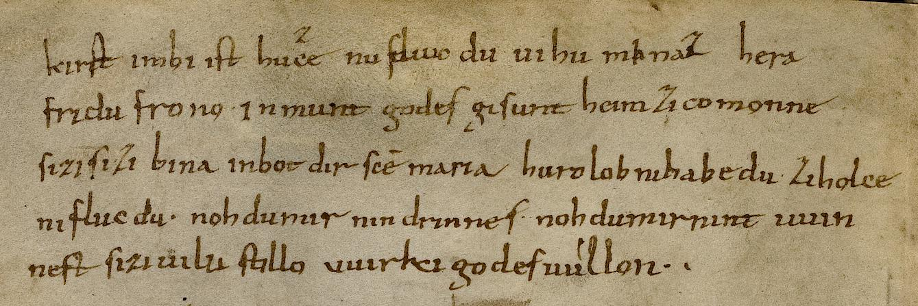 Codex Palatinus latinus 220, Fol. 58r, mit dem Lorscher Bienensegen (Ausschnitt, gedreht).